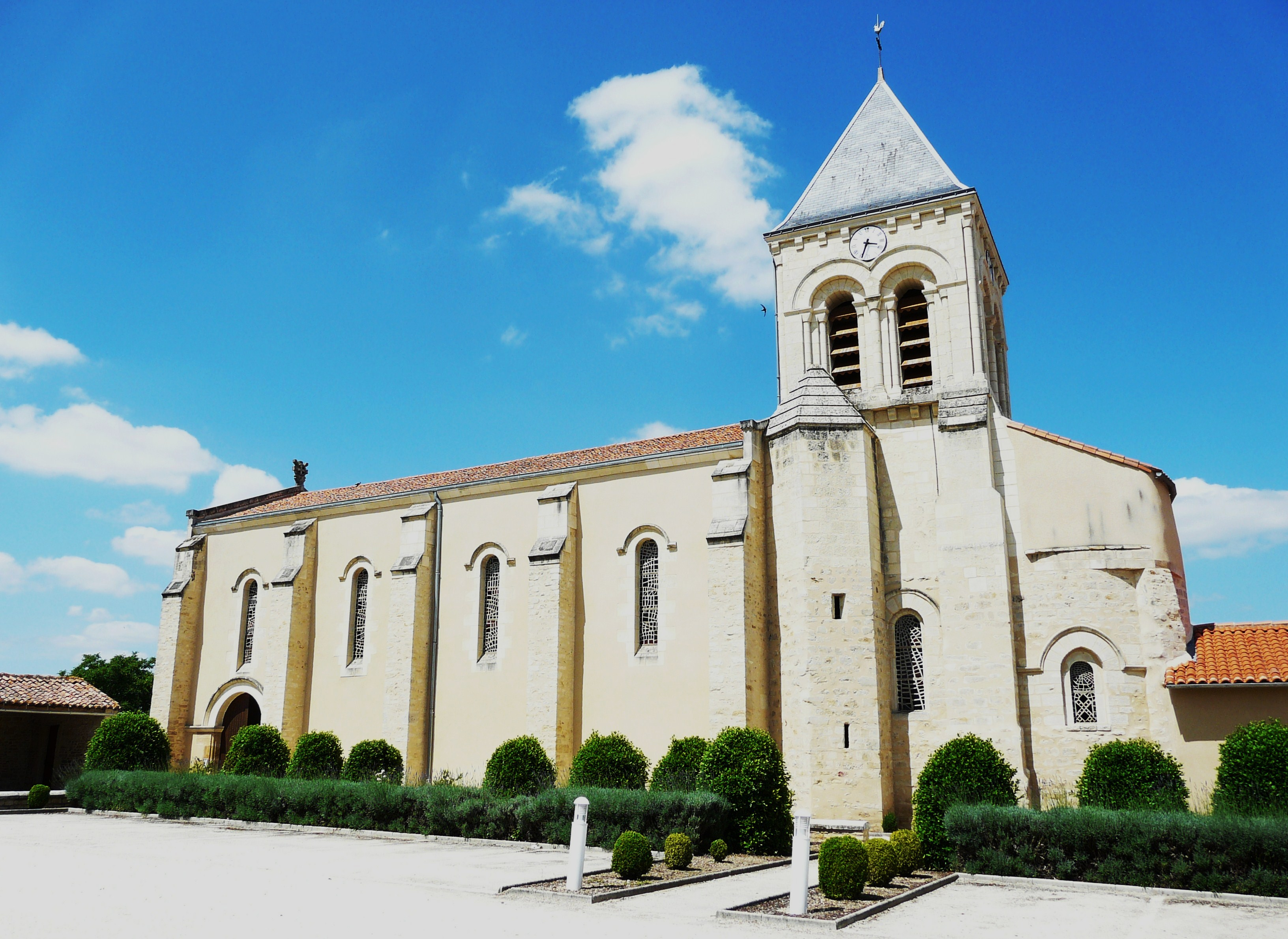 Église Saint Pierre de Louzy